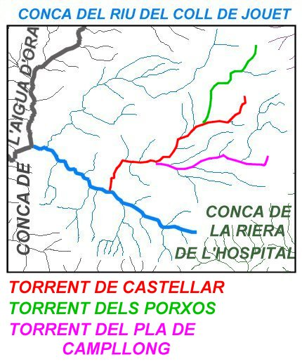 Mapa de la conca del Riu del Coll de Jouet (tributari de l'Aigua d'Ora), en el qual s'hi han destacat el Torrent de Castellar, el Torrent dels Porxos i el Torrent del Pla de Campllong.